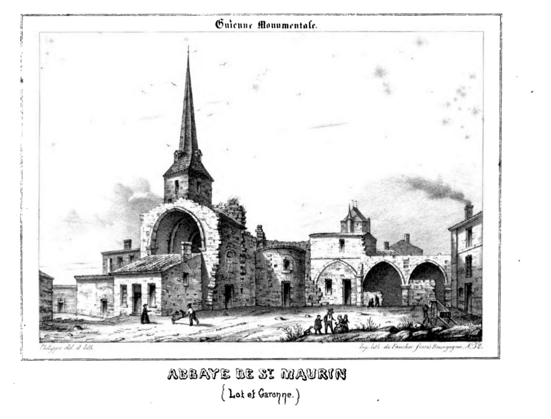 Abbaye de St Maurin (Lot et Garonne)